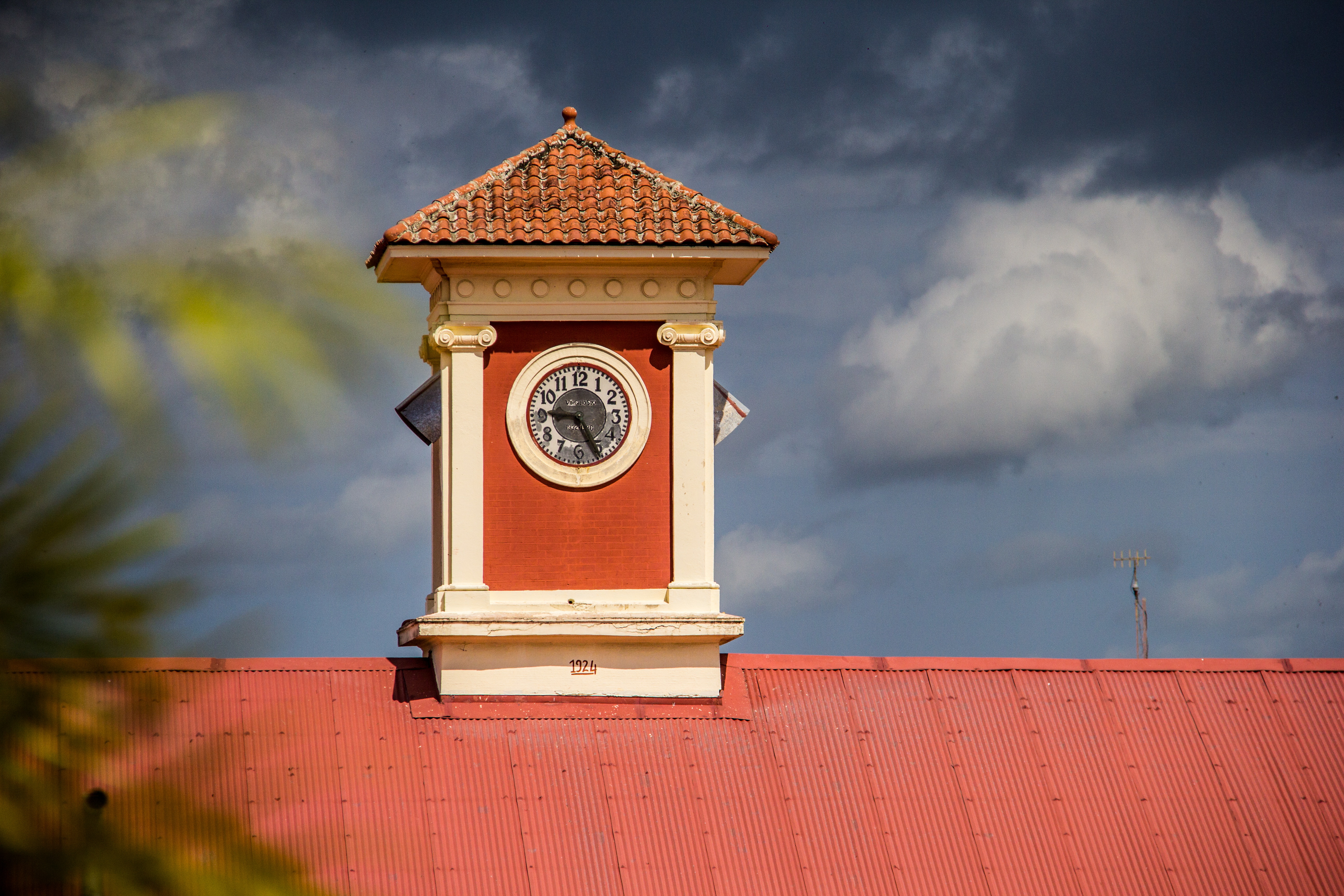 La Escuela Presidente Porras de Las Tablas, también conocida como Escuela Modelo, no es solo una institución educativa, también es, un punto de interés turístico, dado que su monumental estructura neoclásica (patrón arquitectónico que era el referente de las obras constructivas de Belisario Porras), es atractiva para los visitantes, tanto nacionales como extranjeros y está catalogada como un monumento histórico a nivel nacional. Es un reloj único en Panamá. A sus engranajes hay que darles cuerda cada 15 días, pues en la medida en que sus tres campanas van sonando, de esa misma manera los rolos de los cables, con un peso de 500 libras cada uno, se van desarrollando. Instalado en la torre de la escuela Presidente Porras, en la ciudad de Las Tablas, provincia de Los Santos, llegó a ese lugar en 1935 por iniciativa del boticario Virgilio Sosa. De este modelo de reloj, la empresa alemana J.F. Weule, fundada el 20 de octubre de 1836, solo fabricó dos, fundiendo cada una de sus piezas en moldes que luego eran destruidos. La idea de ubicarlo en la torre de la escuela, dicen los lugareños, fue para que el sonido de sus campanas se escuchara lo más lejos posible. No obstante, pocos conocen el valor histórico de esta joya del tiempo, que sirvió por muchos años para que los campesinos, guiados por el toque de sus campanas, se levantaran y llegaran a tiempo a sus labores en el campo.